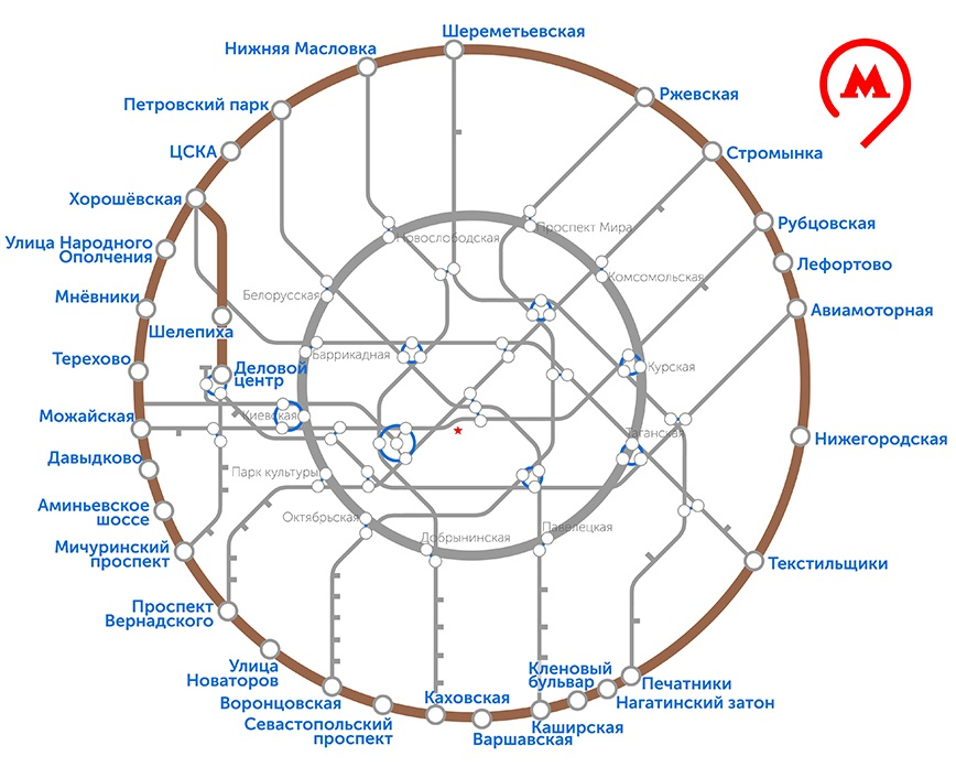 Третий пересадочный контур метро, карта